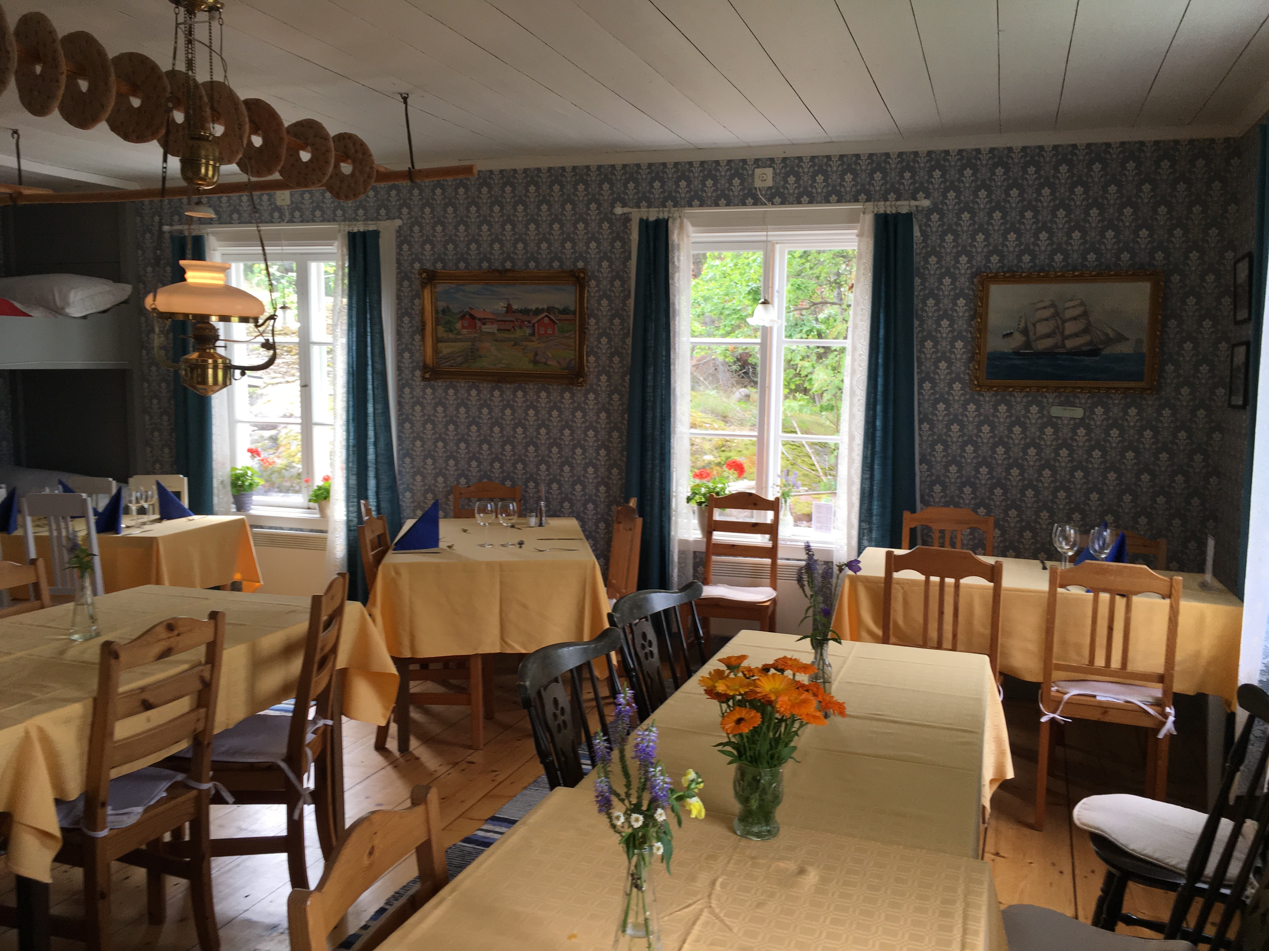 Sisäkuva Enighetenin majatalosta Degerby, Föglö.